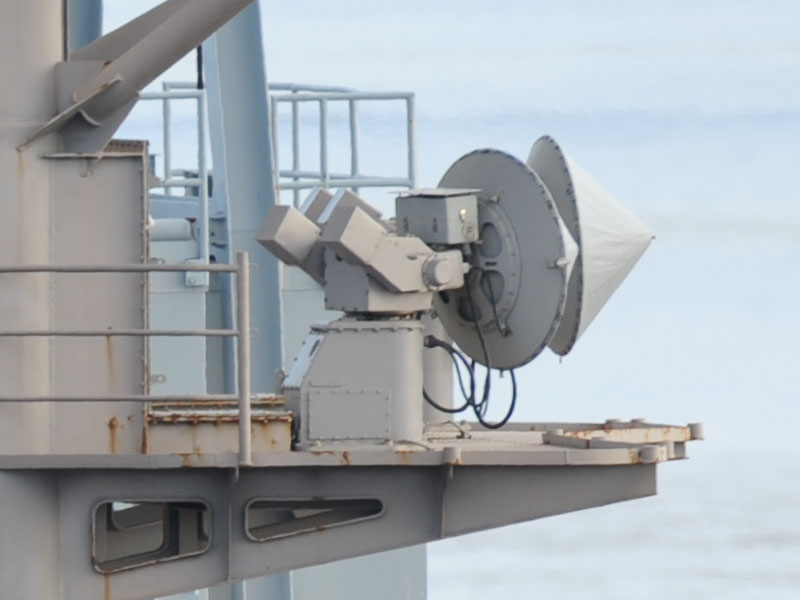 Две антенны радара AN/SPN-46 в кормовой части надстройки авианосца CVN-76 «Рональд Рейган», 2012-01-10